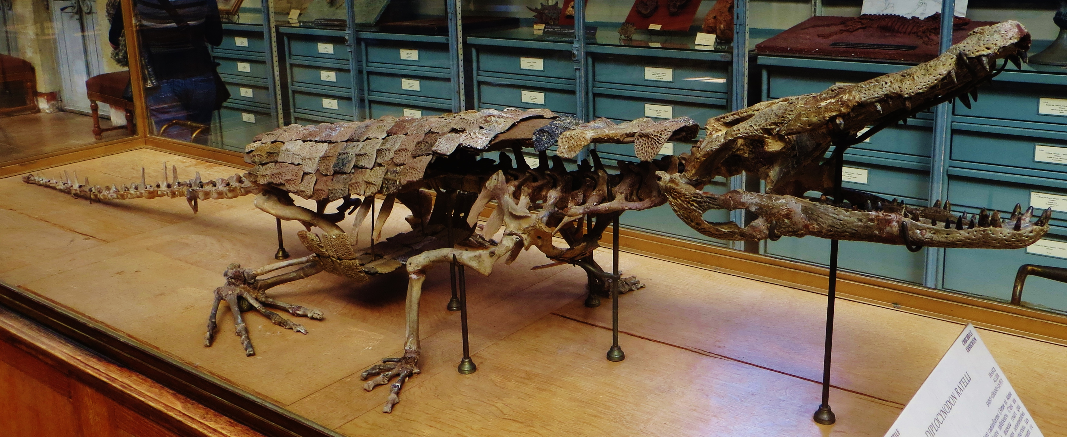 Fossil of Diplocynodon, an extinct reptile- Took the photo at Musee d'Histoire Naturelle, Paris